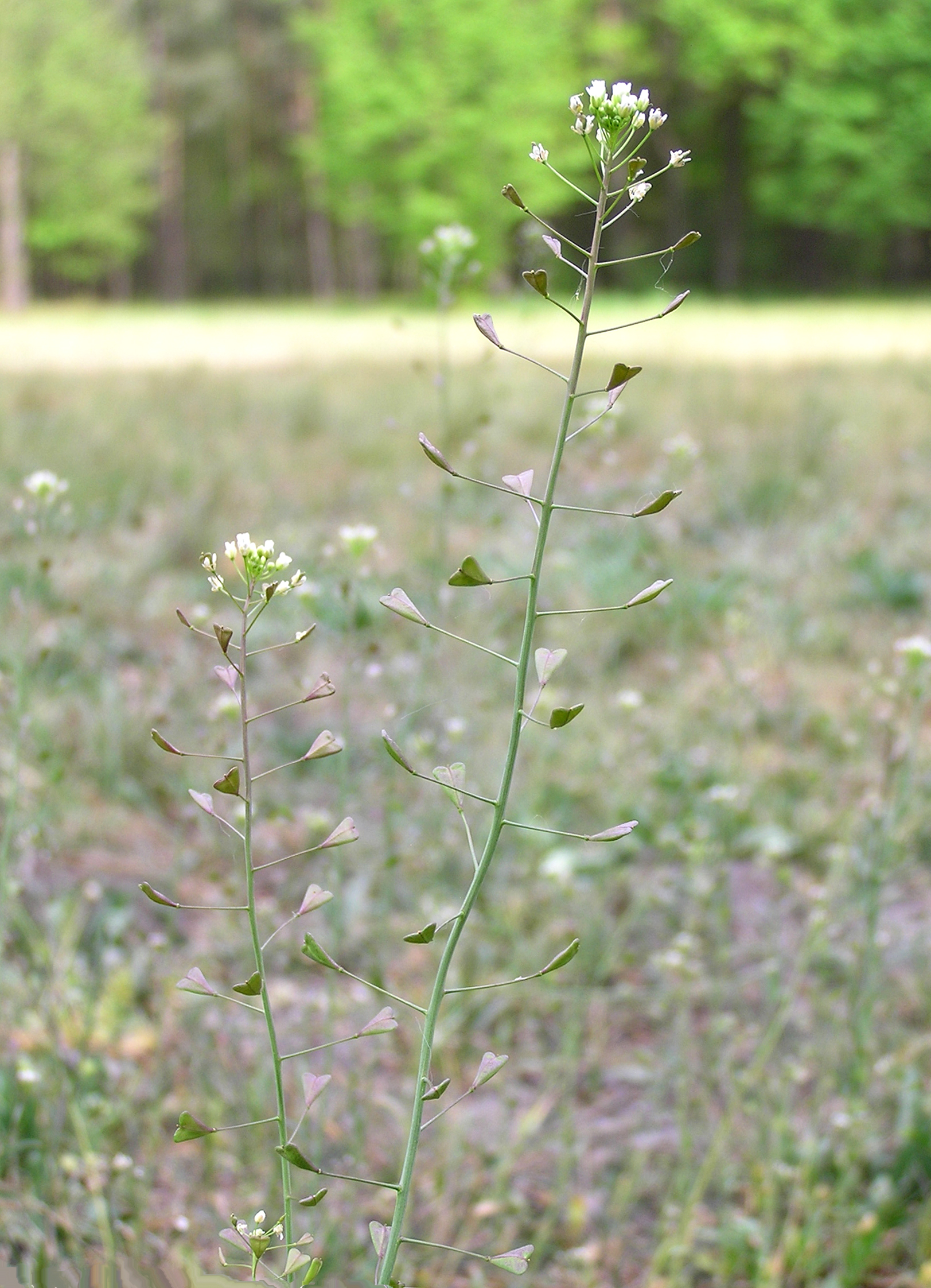 Abbildung von Capsella bursa-pastoris